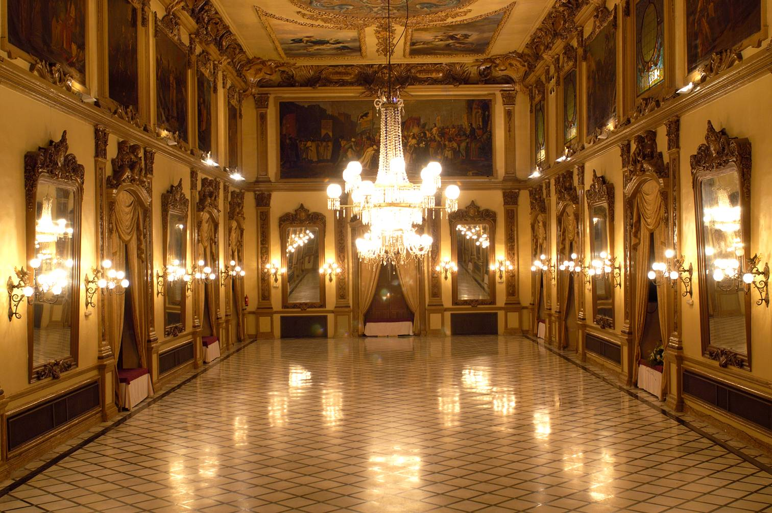 Salón Liceo del Real Círculo de la Amistad, Córdoba (España)